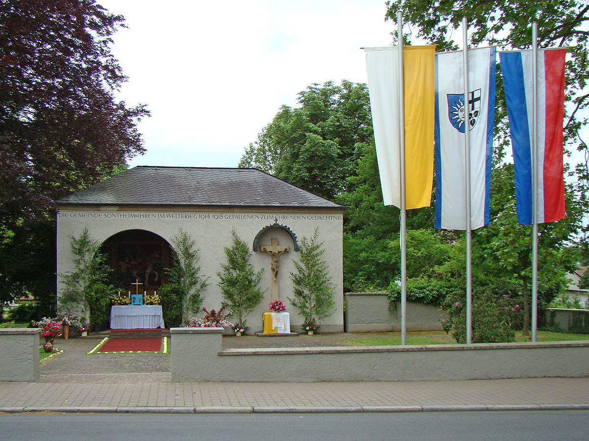 Friedhofskapelle (Kriegerdenkmal) geschmückt zur Fronleichnamsprozession 2008 in Heilbronn-Sontheim